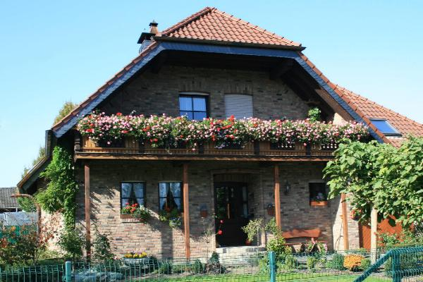 Wohnhaus in Wegberg-Tetelrath